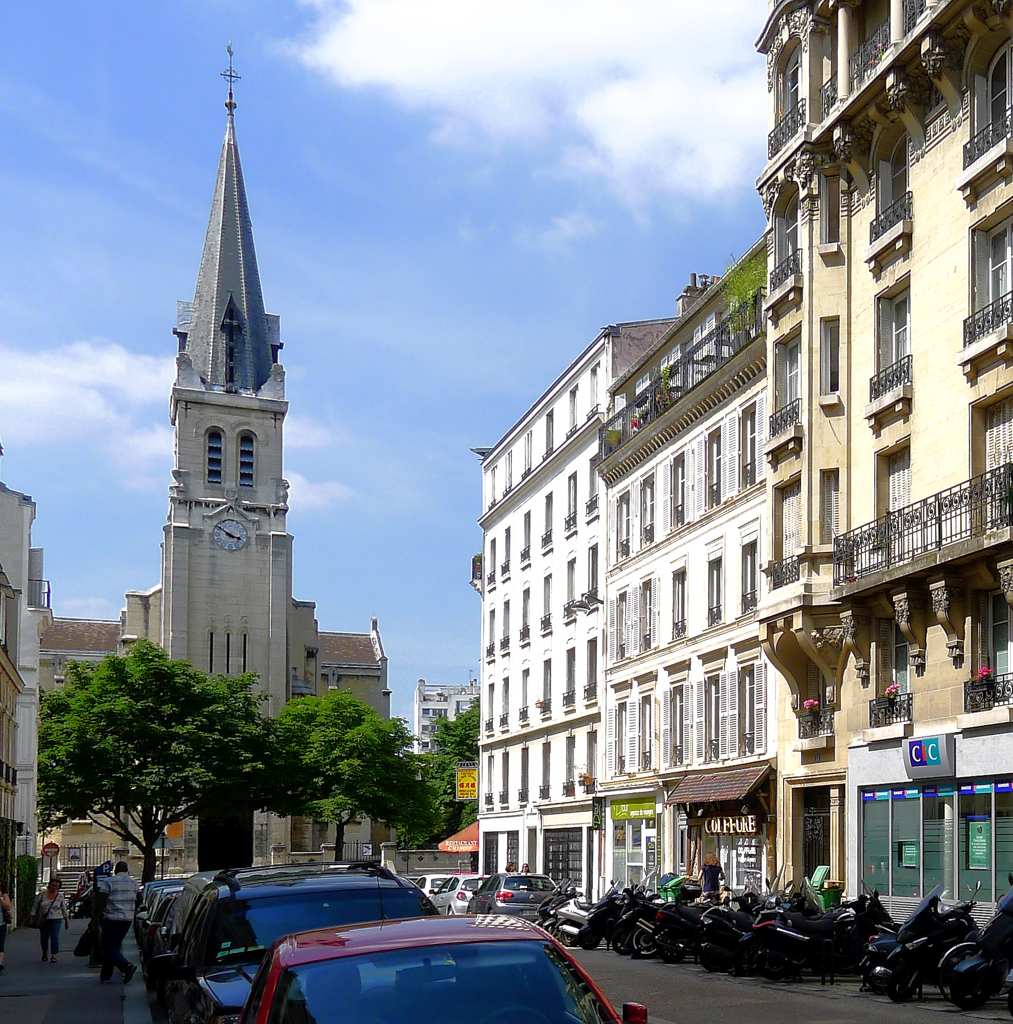 Rue Gerbert (en arrière-plan, l'église St-Lambert-de-Vaugirard) - Paris XV